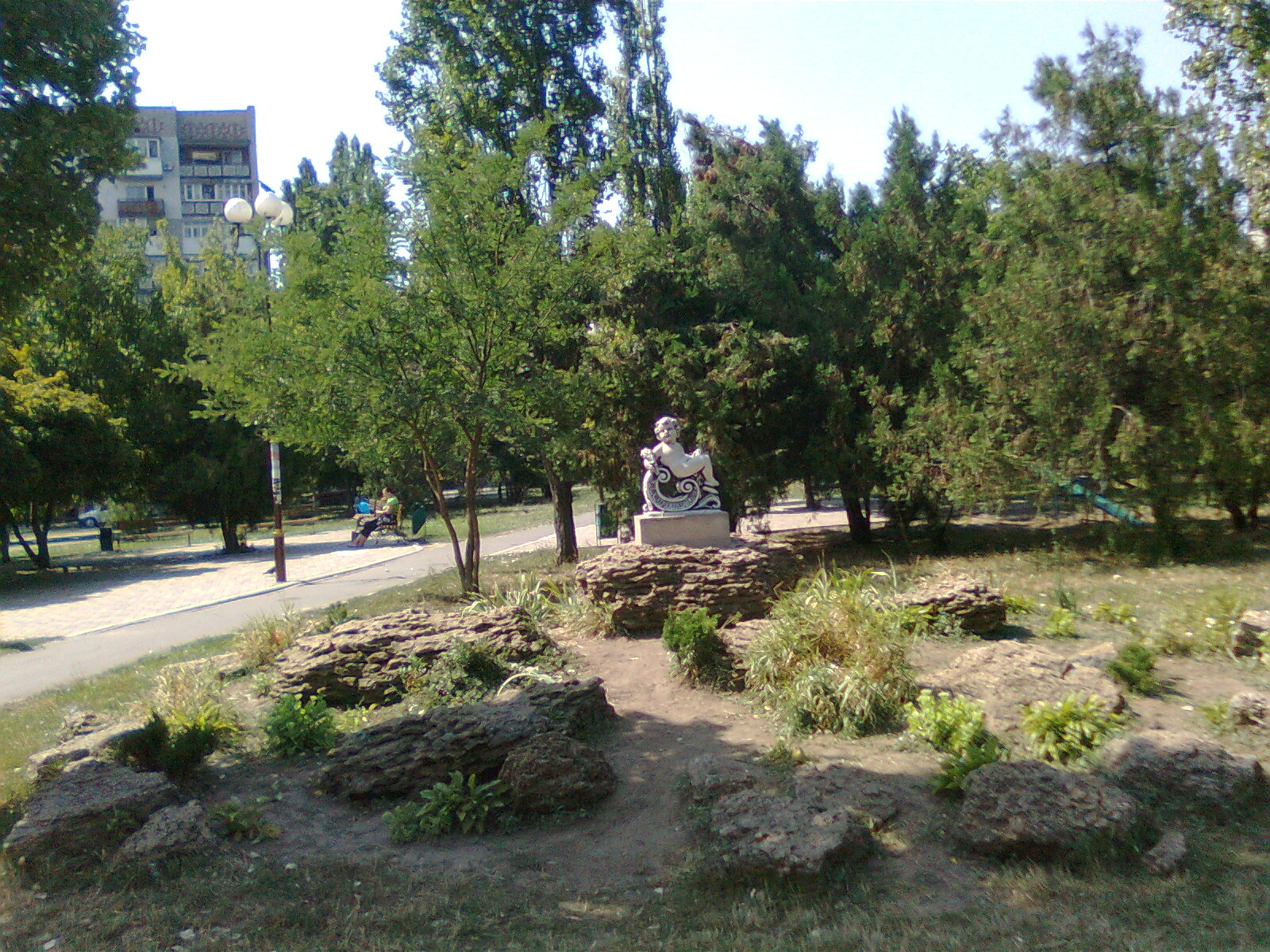 Молодіжний парк, м. Чорноморськ